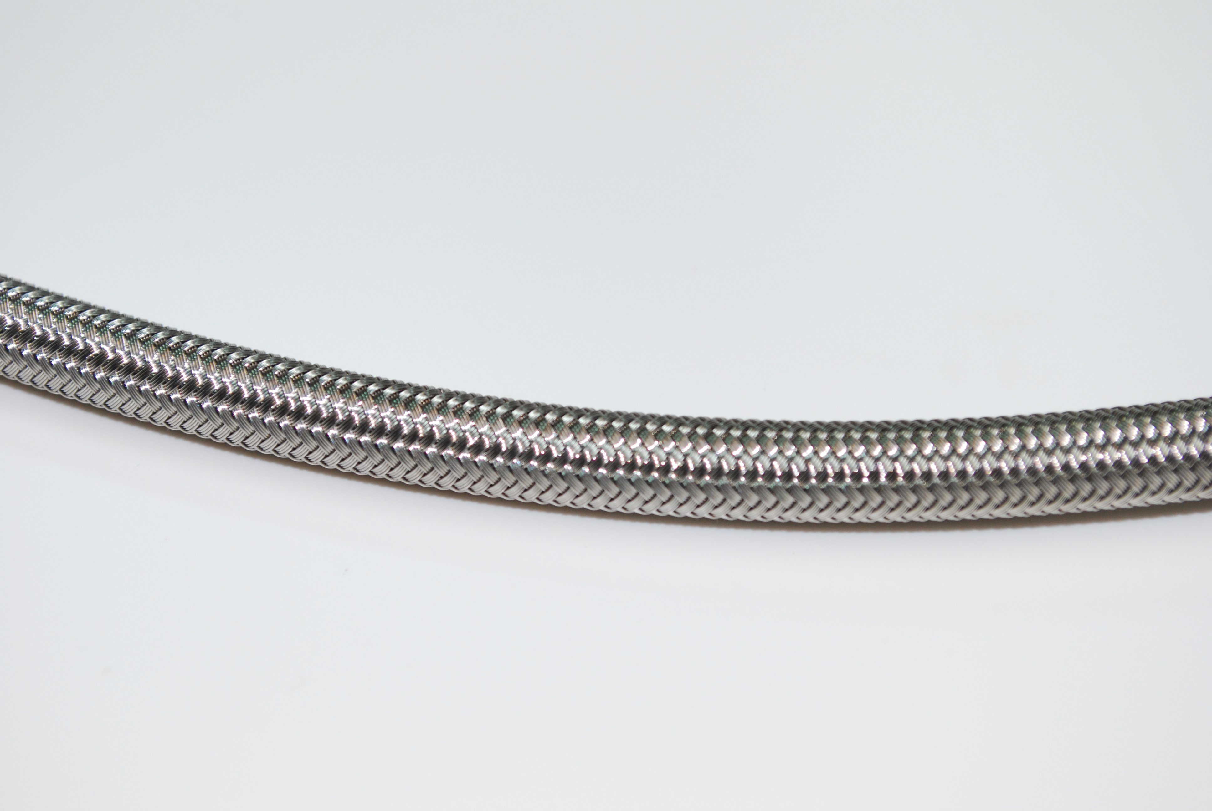 Nahaufnahme einer Evolity Brakes Stahlflex Bremsleitung